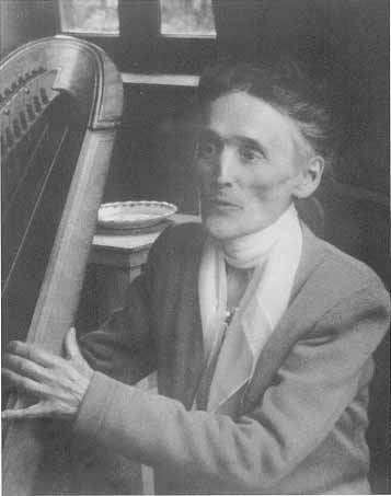 Henriette Renié (1875–1956), harpiste française